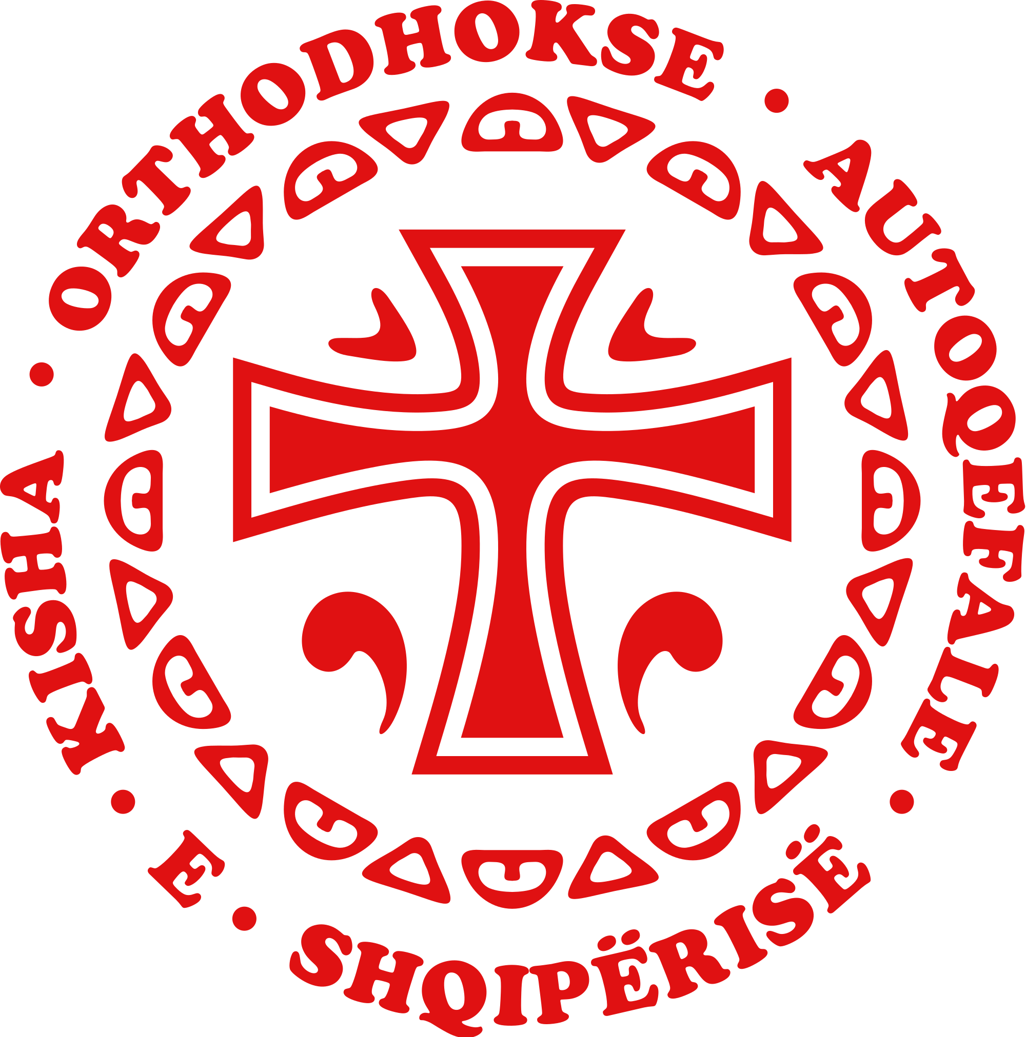 Logo zyrtare e insititucionit